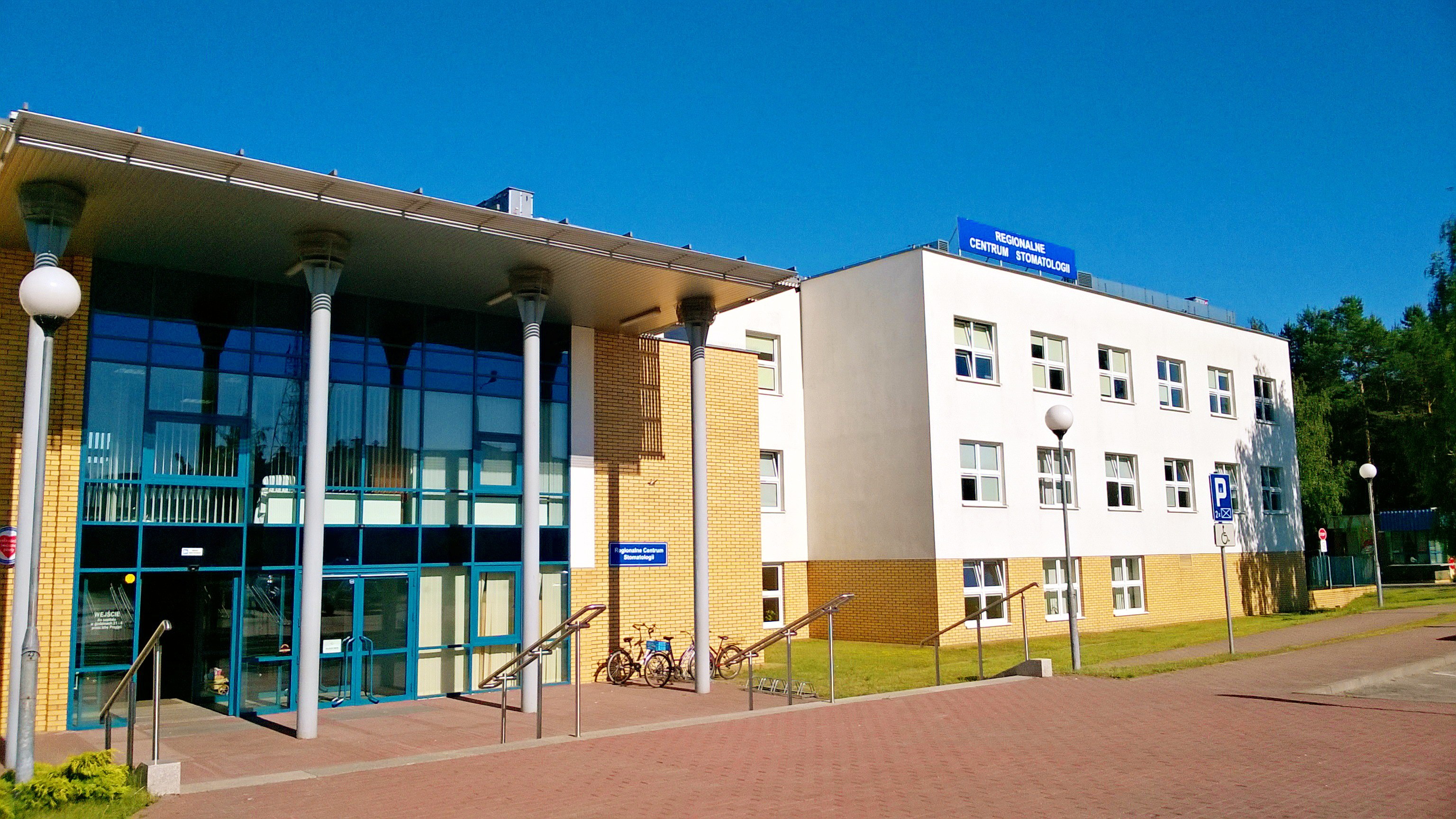 Regionalne Centrum Stomatologii w Toruniu